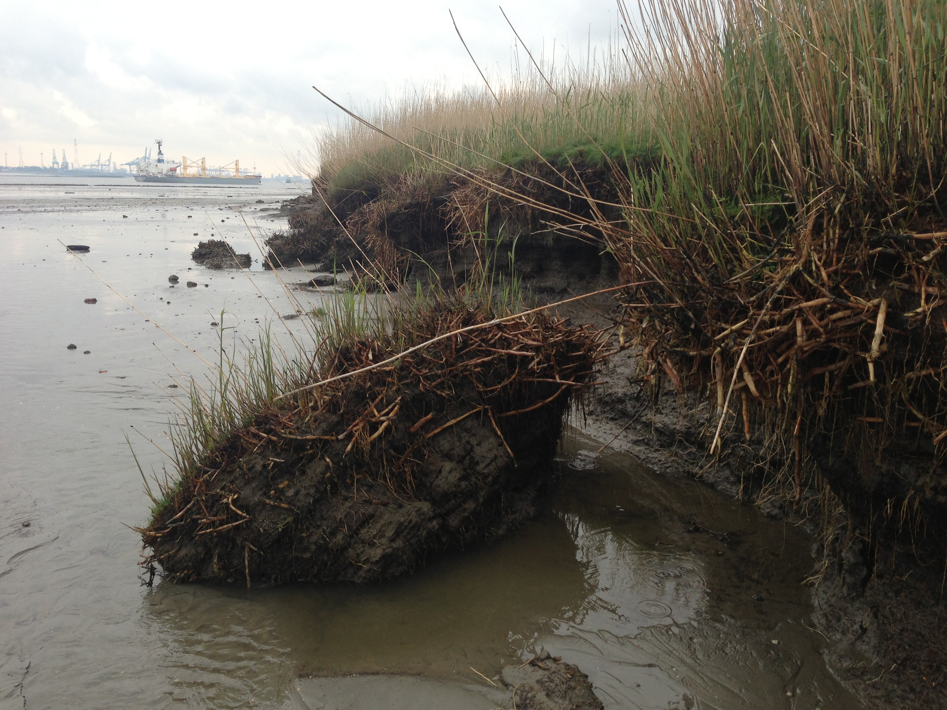 Erosie schor buitenrand Saeftinghe mei 2013